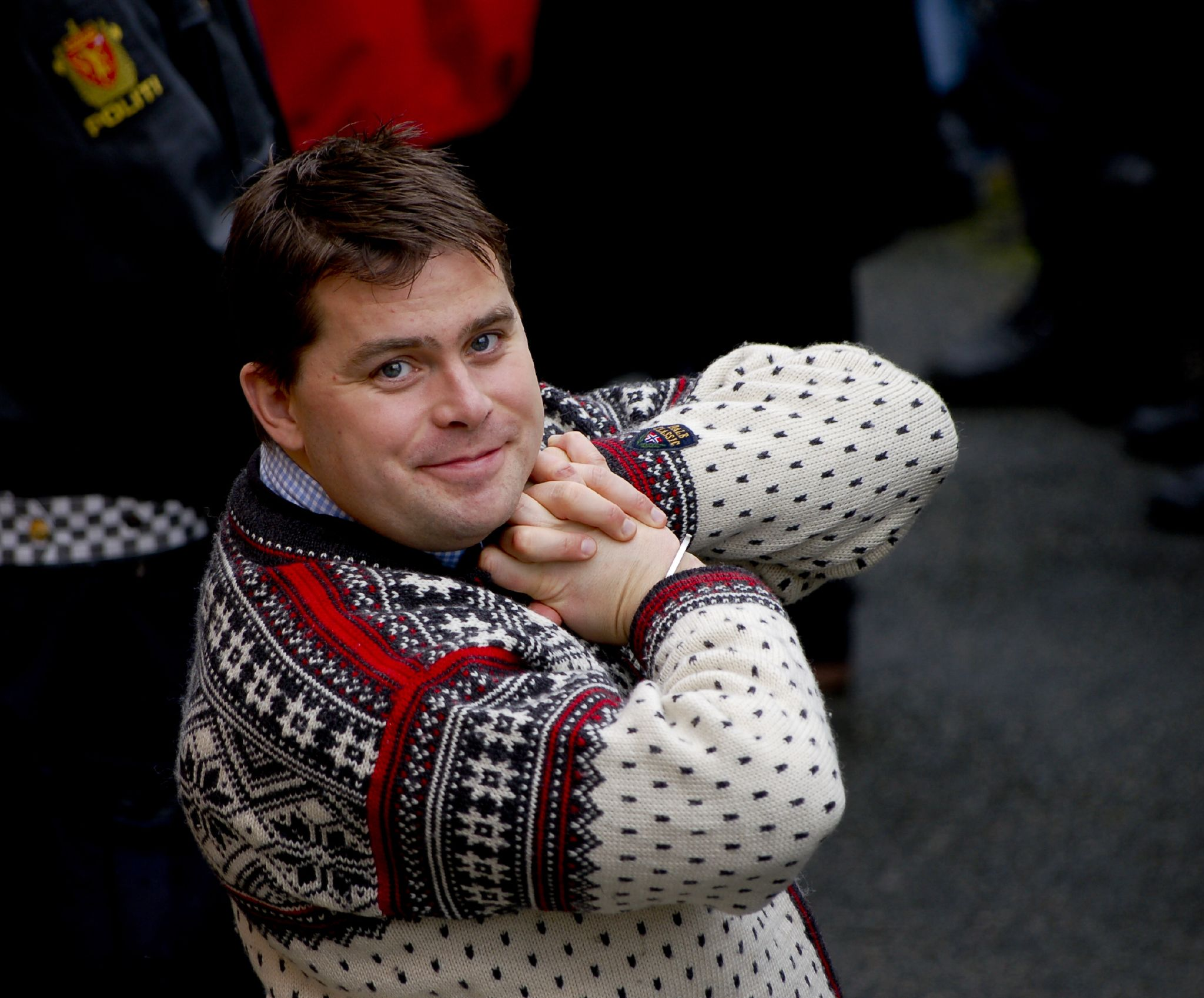 David Toska i håndjern, fotografert under en åstedsbefaring i NOKAS-rettsaken.